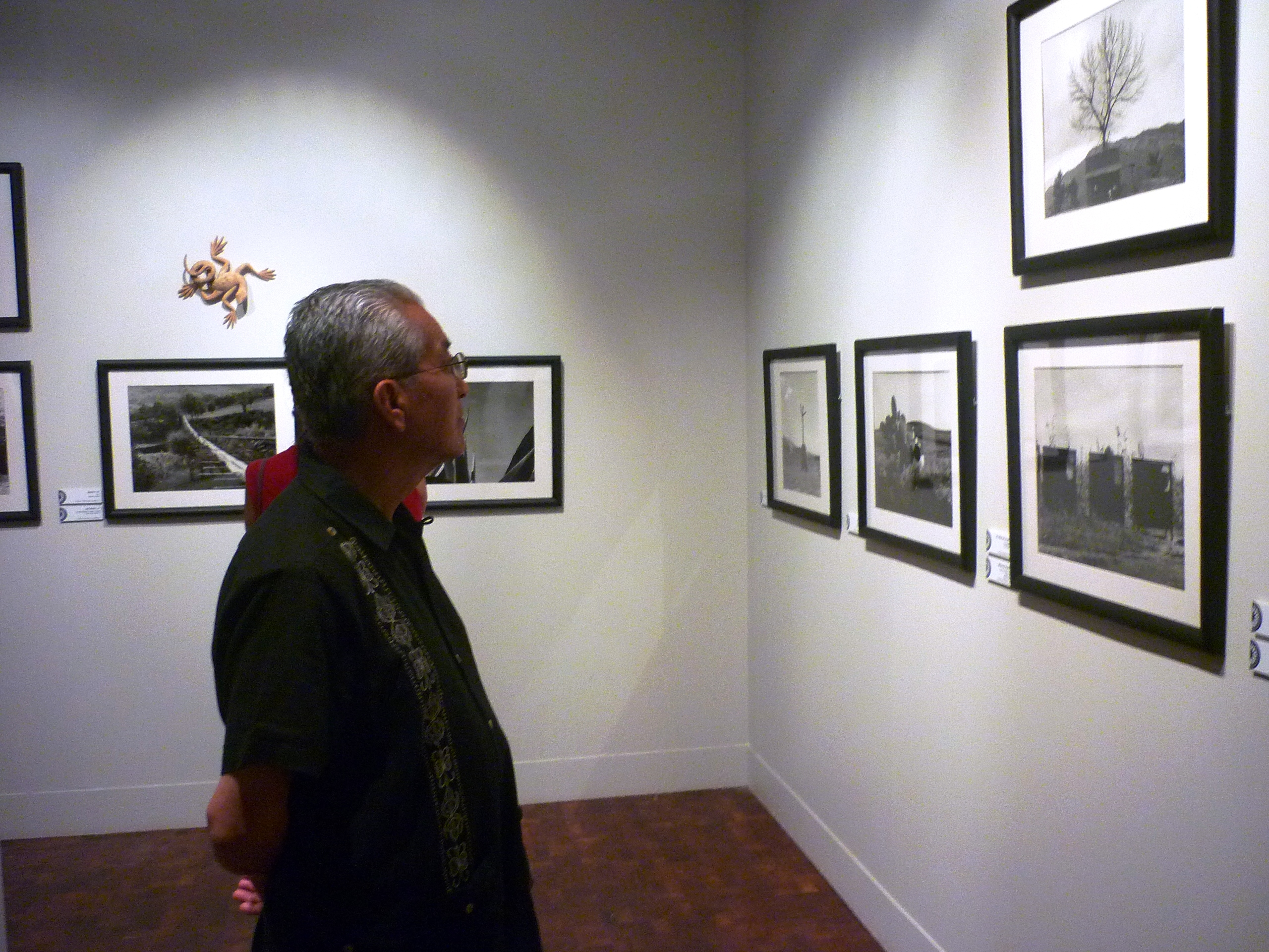 Visitante de la inauguración de la exposición de Mariana Yampolsky en el Museo de Arte Popular